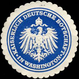 Sealing stamp Title: Kaiserlich Deutsche Botschaft in Washington Description: blau, weiß, geprägt Place: Washington size: 4 cm